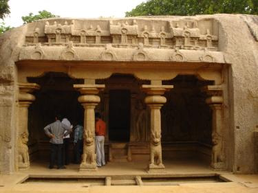 Varaha Cave, Mahabalipuram